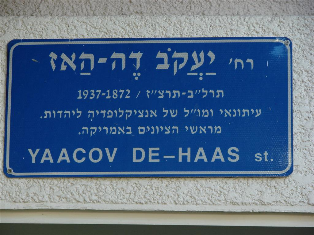 יעקב דה האז - שלט רחוב - צפון תל אביב